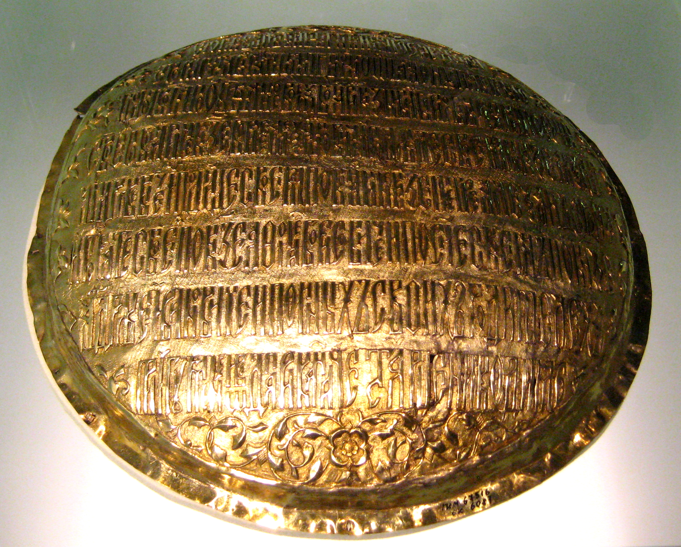 КЛЕЙМА С ГРОБНИЦЫ ПРЕПОДОБНОГО ПАФНУТИЯ БОРОВСКОГО 1673 год Москва Серебро; золочение, канфарение, чеканка, ковка Диаметр – 48,2–49 Поступили в 1929 году Надписи чеканные вязью: ЛЕТА 1673 ГОДУ НОЯБРЯ ВЪ 30 ДЕ(НЬ) ПРИ ДЕРЖАВЕ БЛ(А)ГОВЕРНАГО И БЛ(А)ГОЧЕСТИВАГО ВЕЛИКАГО Г(О)С(У)Д(А)РЯ Ц(А)РЯ И ВЕЛИКАГО КН(Я)ЗЯ АЛЕКСЕЯ МИХАЙЛОВИЧА ВСЕА ВЕЛИКИИЯ И МАЛЫЯ И БЕЛЫЯ РОСИИ САМОДЕРЖЦА СИЮ РАКУ В ДОМ ПР(Е)СВТЫЯ Б(ОГОРО)Д(И)ЦЫ Ч(Е)СТНАГО И СЛАВНАГО ЕЯ Р(О)Ж(Д)ЕСТВА СТРОИЛ И ПОСТАВИЛ НАД МОЩ(А)МИ ПР(Е)П(О)ДОБНАГО ОТЦА ПАФНУТИЯ БОРОВСКАГО ЧЮДОТВОРЦА ПО ОБЕЩАНИЮ СВОЕМУ БОЯРИН КН(Я)ЗЬ ИВАН БОРИСОВИЧЬ РЕПЪНИН ПО ОТЦЕ СВОЕМ ПО БОЯРИНЕ КН(Я)ЗЕ БОРИСЕ АЛЕКСАНДРОВИЧЕ И ПО ДЕДЕ СВОЕМЪ ПО КН(Я)ЗЕ АЛЕКСАНДРЕ АНДРЕЕВИЧЕ И ПО ДЯДЕ СВОЕМЪ ПО БОЯРИНЕ КН(Я)ЗЕ ПЕТРЕ АЛЕКСАНДРОВИЧЕ И ПО БРАТЕ СВОЕМ ПО КН(Я)ЗЕ АФ(А)НАСЕ БОРИСОВИЧЕ И ПО С(Ы)НЕ СВОЕМ ПО КН(Я)ЗЕ АНДРЕЕ ИВАНОВИЧЕ И ПО ИНЫХЪ СВОИХЪ РОДИТЕЛЕХЪ ПРИ ИГУМЕНЕ ИОВЕДА ПРИ КАНЗНАЧЕЕ СТАРЦЕ НИКОДИМЕ Происходят с раки с дробницами, созданной для гробницы преподобного Пафнутия Боровского в церкви Рождества Богородицы Пафнутиево-Боровского монастыря ГИМ инв. 67516 ОК 6088, 67516 ОК 6087